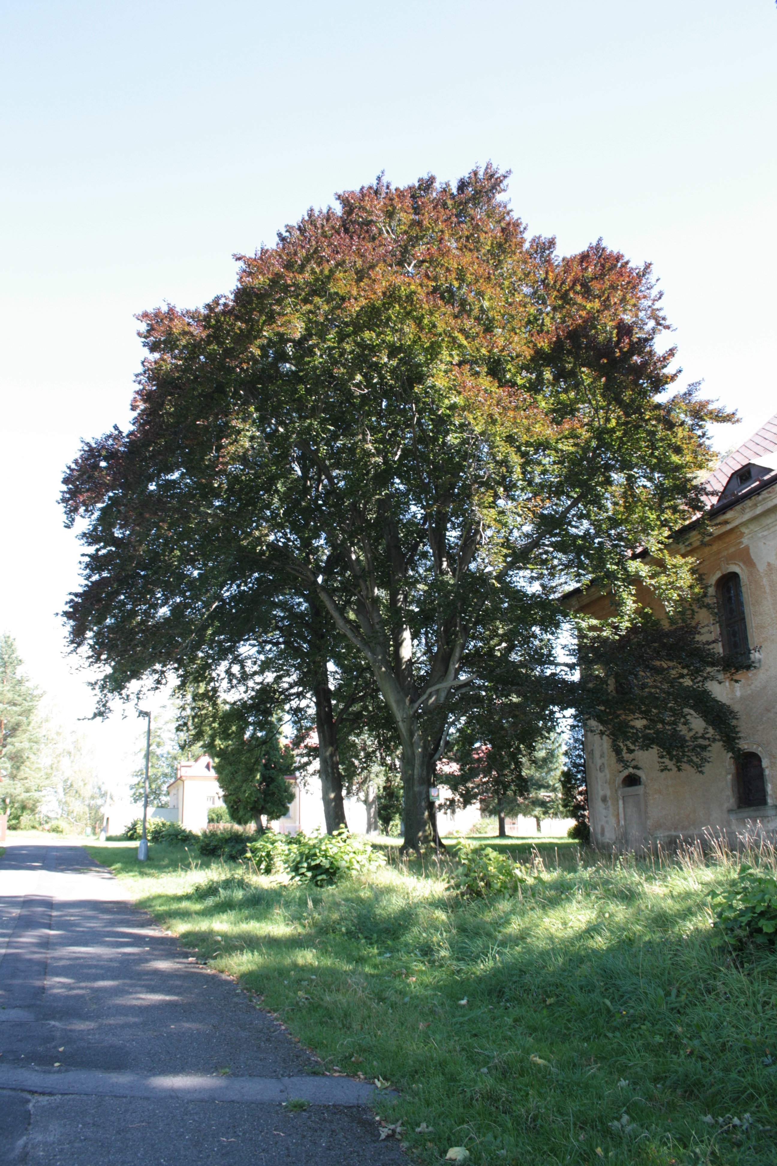 Památný strom buku lesního severně od kostela svaté Kateřiny v Novém Městě pod Smrkem.